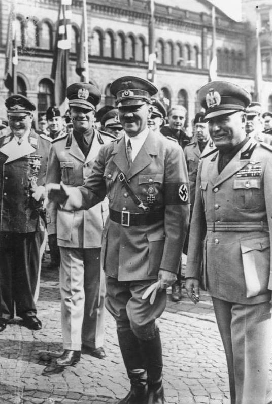 Historische Stunden in München: Der Führer und der Duce beim Abschreiten der Front der Ehrenformationen. Weiter links Graf Ciano und Generalfeldmarschall Göring. Sept. 1938